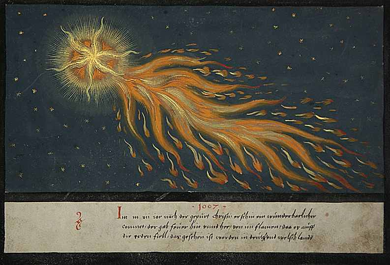 Augsburger Wunderzeichenbuch, Folio 28 (wunderbarlicher Comet, 1007 über Deutschland und dem Welschland) Folio 34: "In 1007 A.D., a wondrous comet appeared. It gave off fire and flames in every direction. It was seen in Germany and Welschland and it fell onto the earth." Augsburger Wunderzeichenbuch, c. 1550